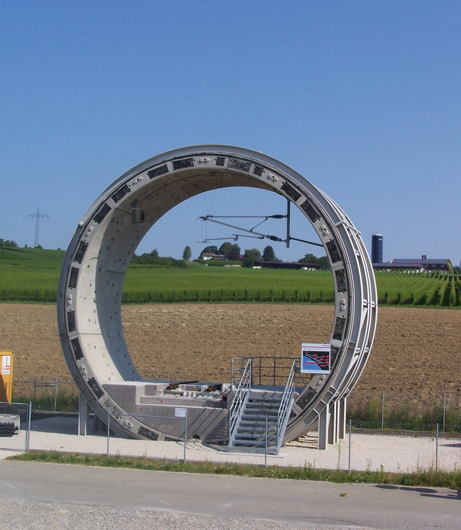 2 Tübbingringe ausgestellt in der Nähe des Katzenbergtunnels